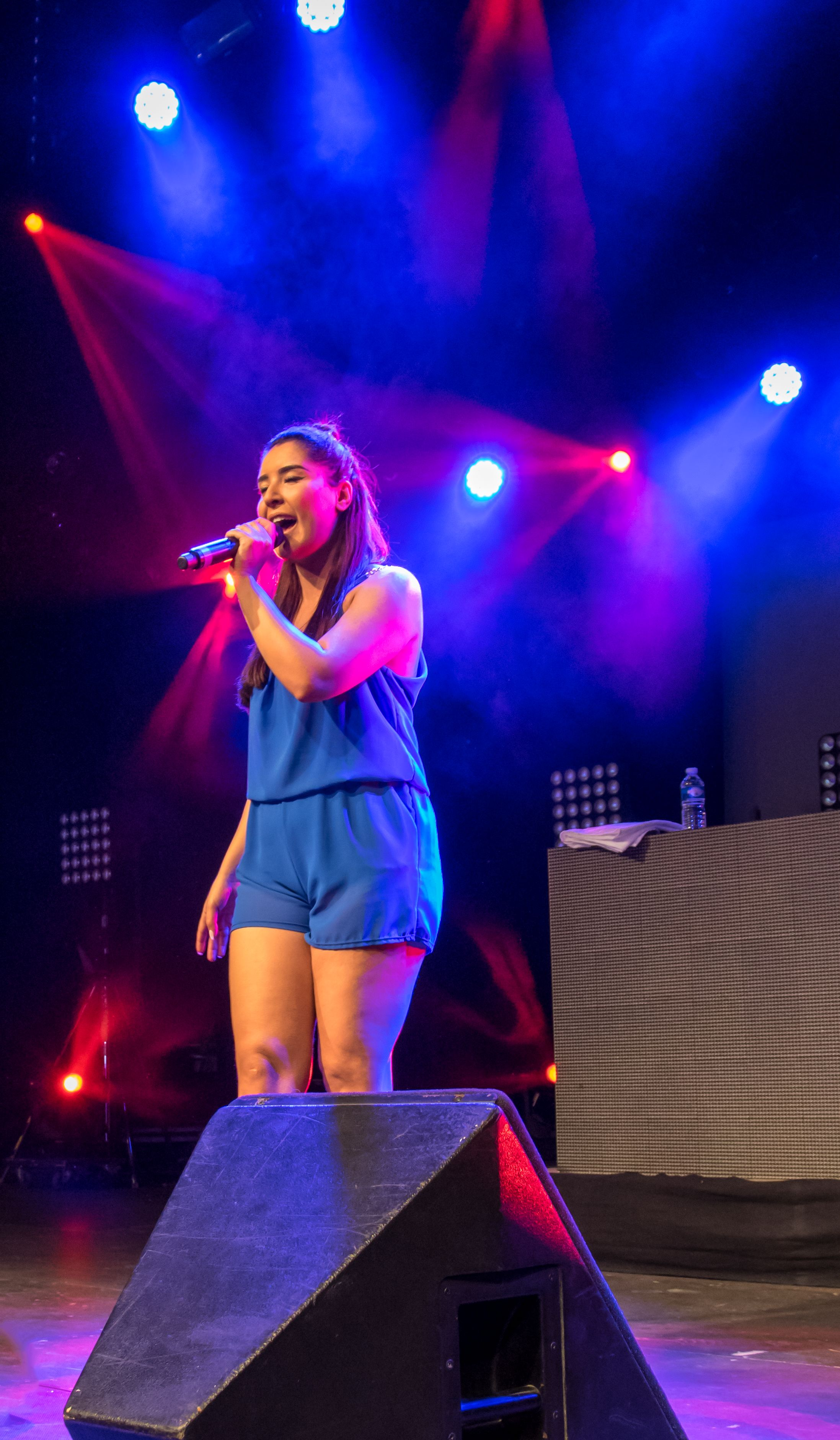 Bilder vom Zelt Musik Festival 2016 in Freiburg im Breisgau Meltem Acikgöz